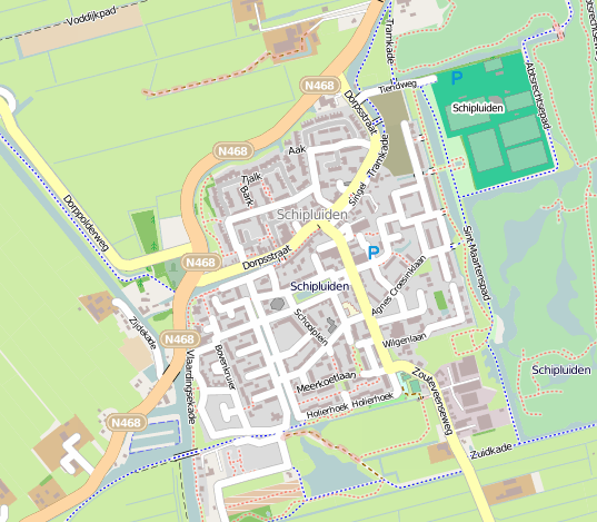 geografische kaart via [1]